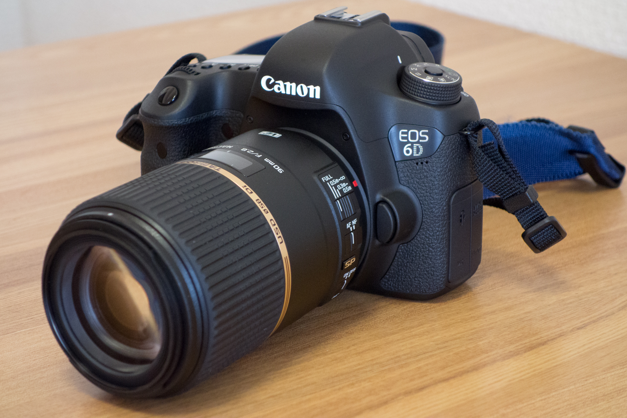 RX100